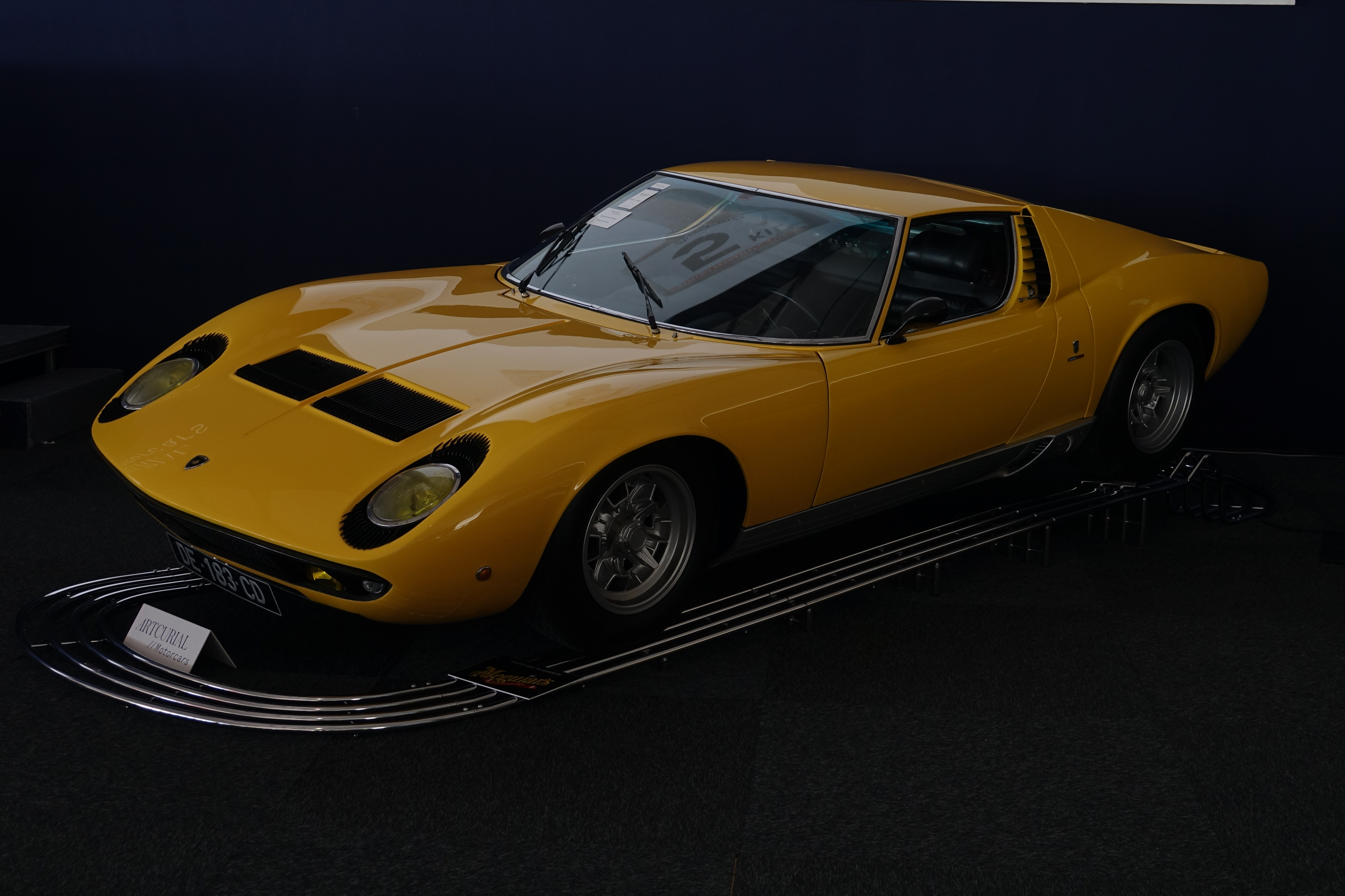 Lamborghini Miura - Vente Artcurial - Le Mans Classic 2018